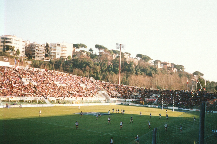 Stadio Flaminio a Roma.